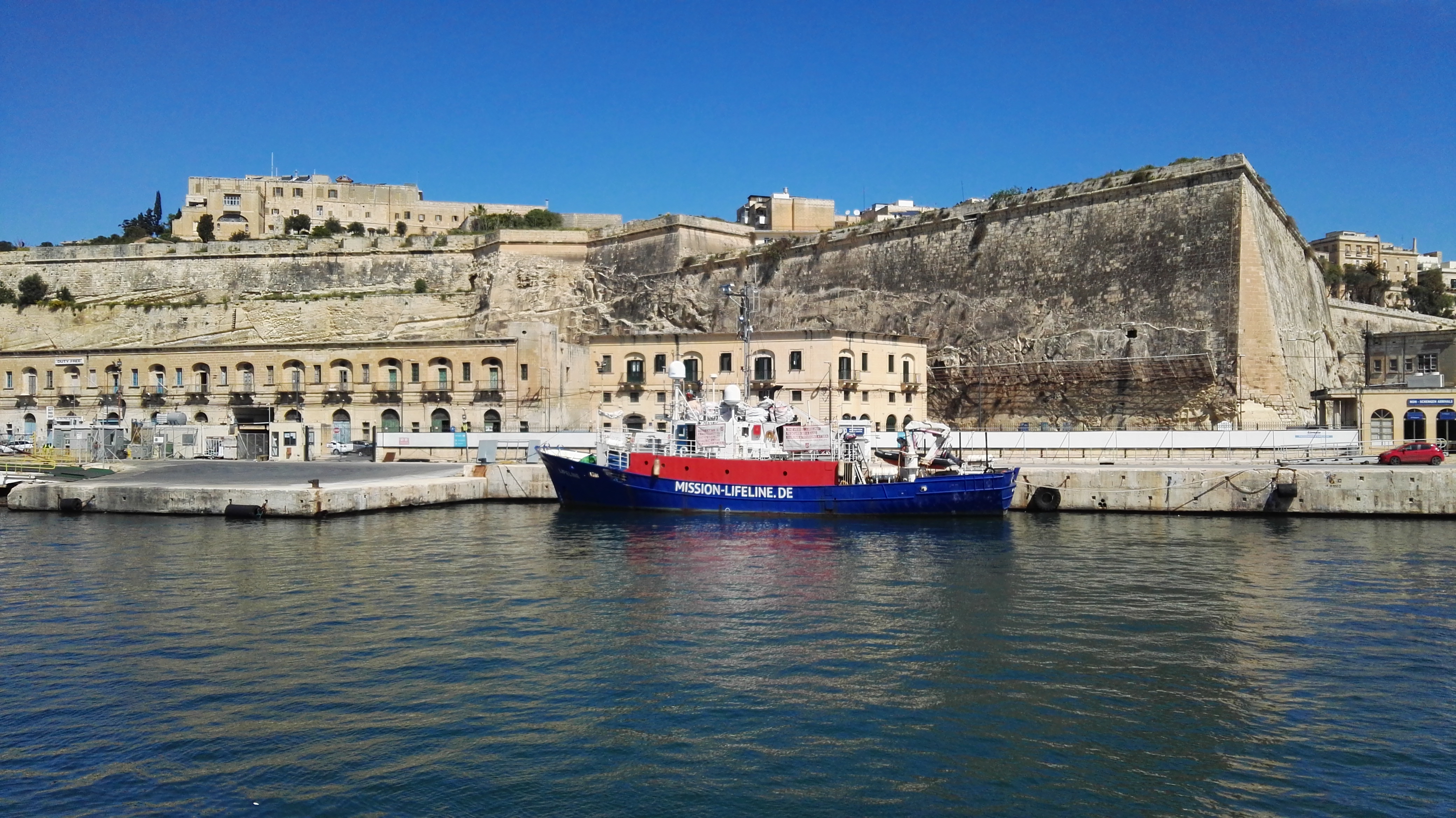 das deutsche Rettungsschiff Lifeline im Grand Harbour von Malta